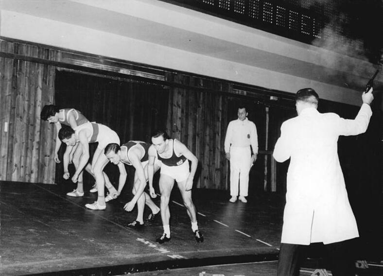 Müller Zentralbild Wendorf Wen-HR 25.1.61 Leichtathletik-Hallensportfest am 25.1.1961 in der Berliner Dynamo-Sporthalle. UBz: Start zum 400 m Lauf. Neue Hallenbestzeit lief Müller (Innenbahn) vom SC Dynamo Berlin.